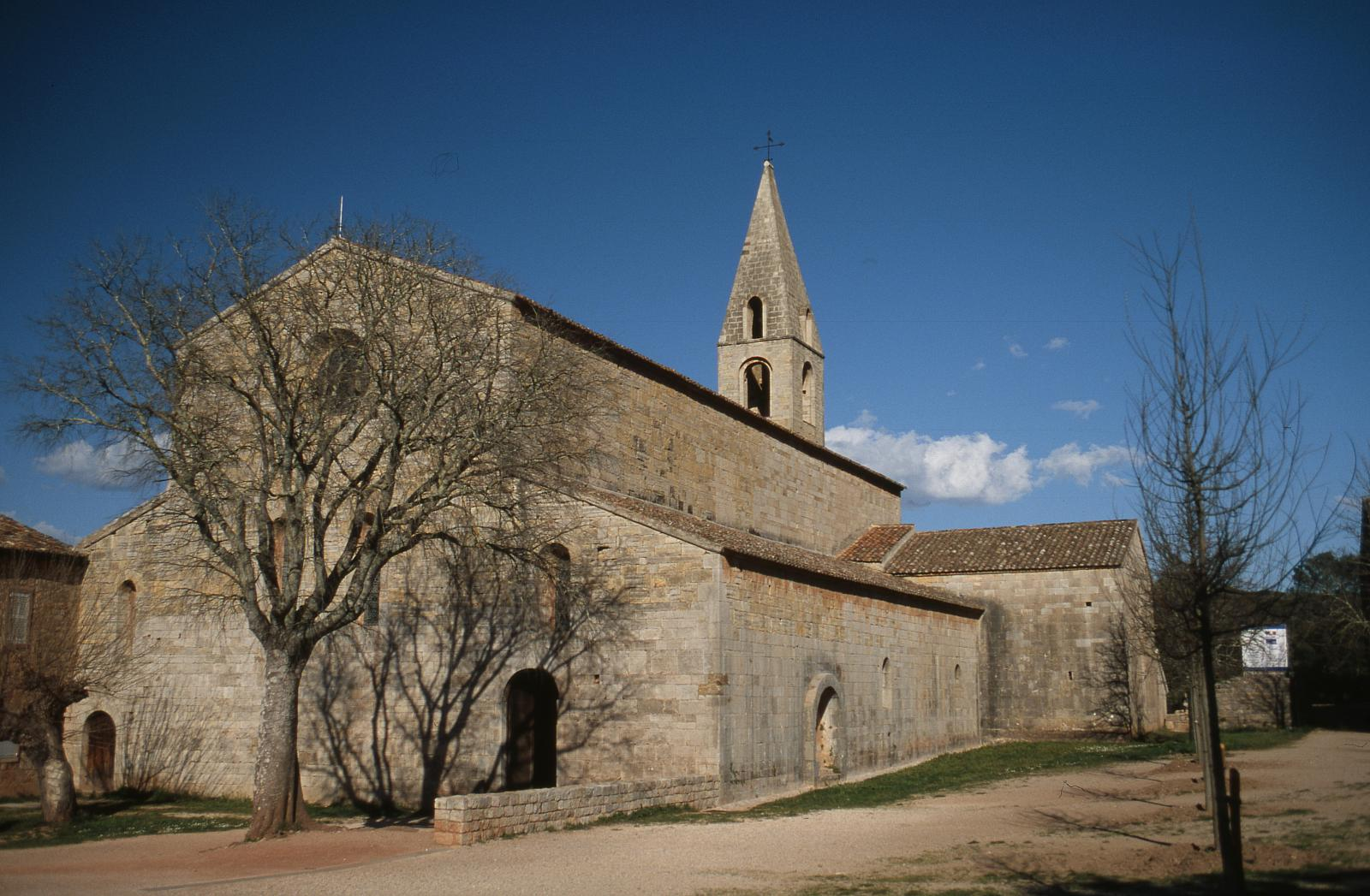 Ansicht der Klosterkirche von Südwesten